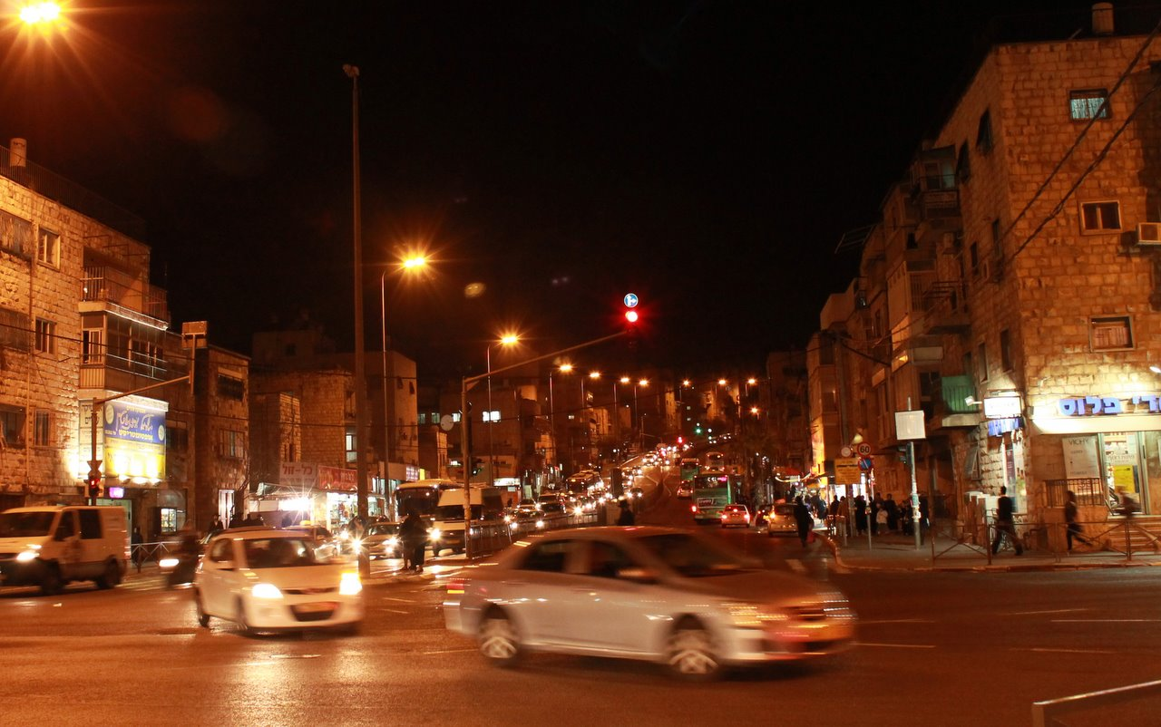 בר אילן באפלה